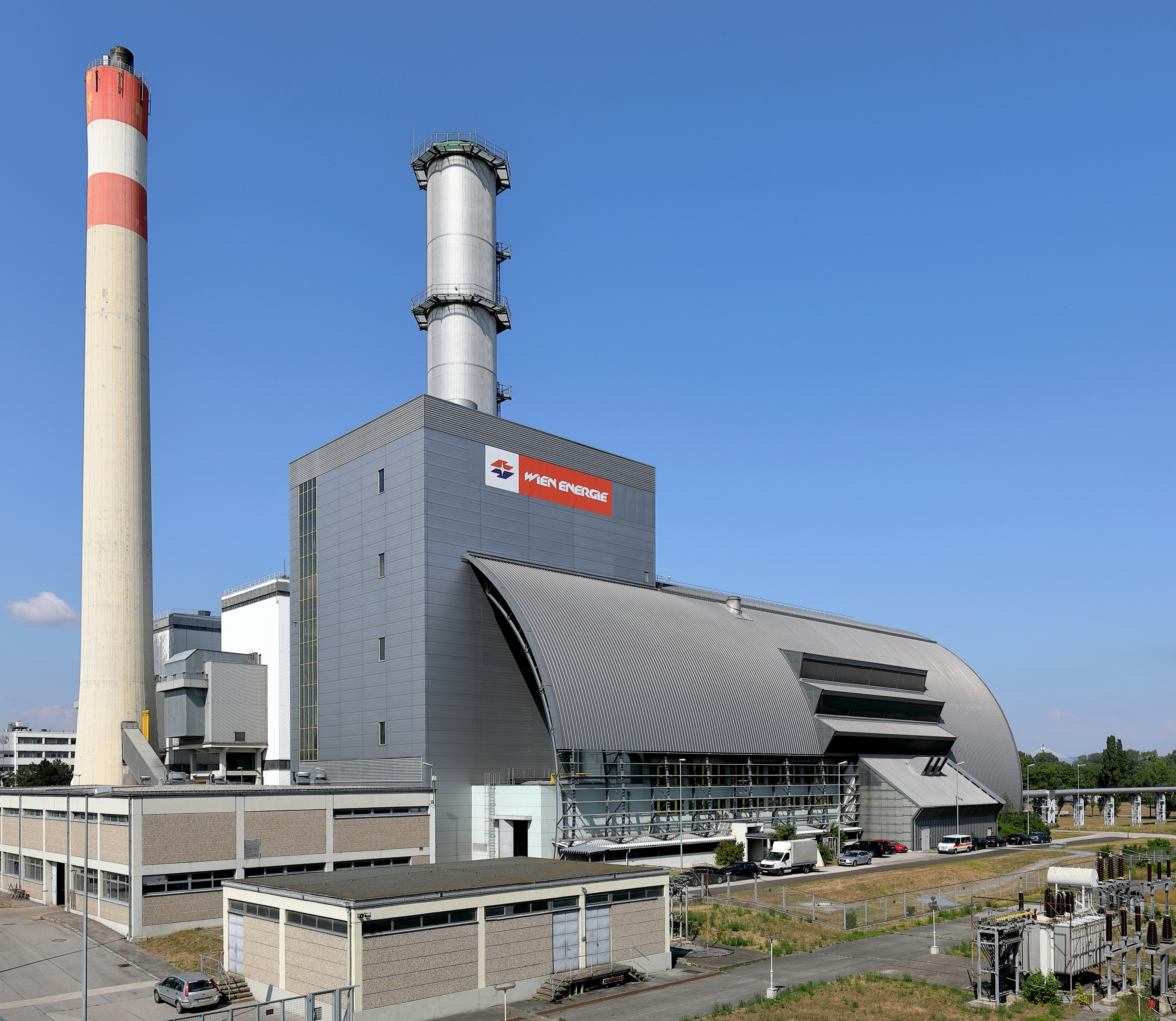 Der Block 3 des Kraftwerkes Donaustadt im 22. Wiener Bezirk Donaustadt und links der Schlot der Blöcke 1 & 2 (außer Betrieb). Der Kraftwerksblock 3, ein Kombiblock mit Gasturbine und Kondensationsentnahmedampfturbine sowie einer Kraft-Wärme-Kopplung, wurde im November 2001 in Betrieb genommen und verfügt über eine elektrische Leistung von über 350 MW sowie eine Fernwärmeleistung von bis zu 250 MW. Die Inbetriebnahme der Krafwerksblöcke 1 & 2 fand ab 1973 (2. 1975) statt (je 162.000 Kilowatt) und wurden aufgrund hoher Erhaltungskosten und geringer Wirkungsgrade im Jahr 1999 bzw. im Jahr 2009 außer Betrieb genommen.